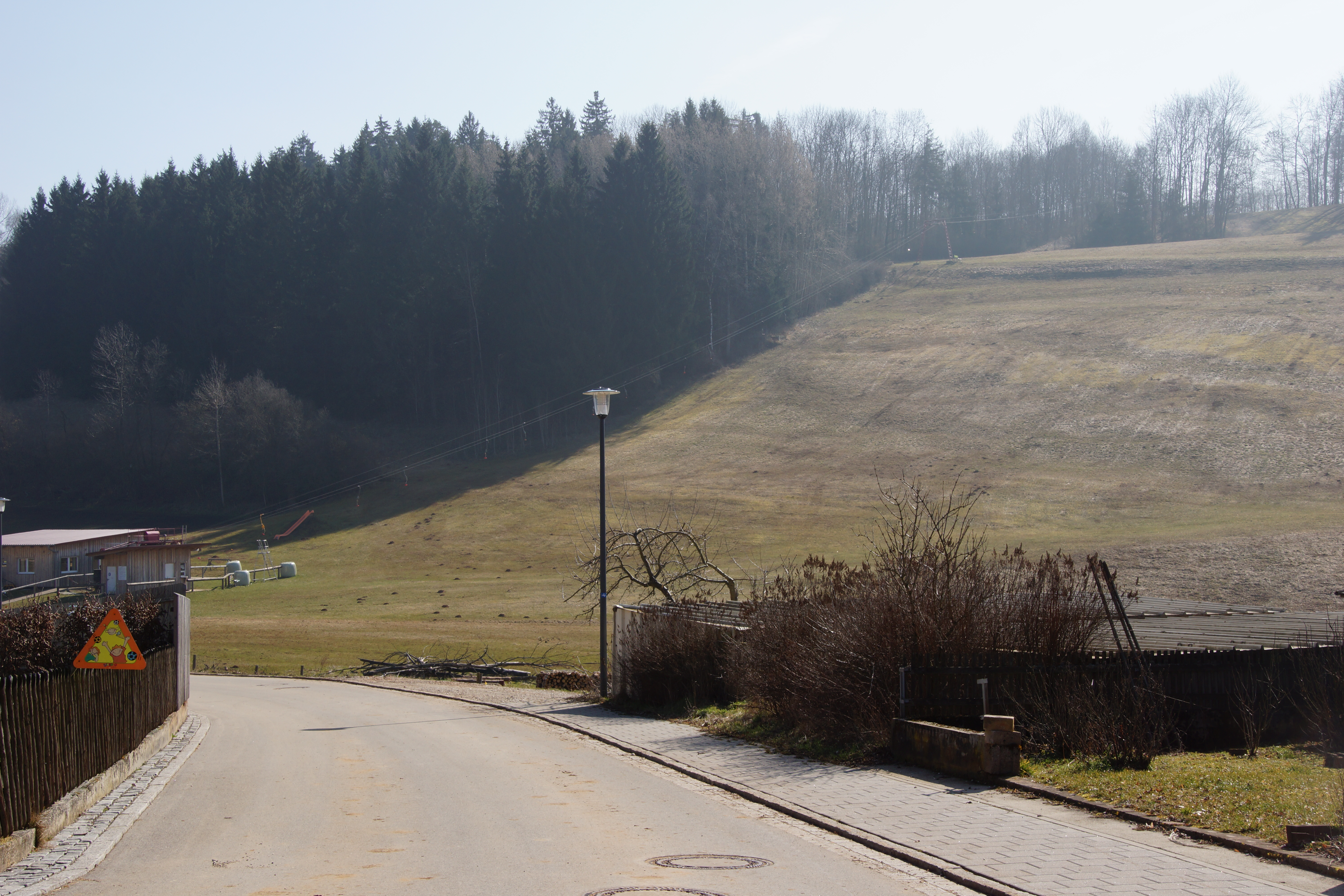 Voggenthal bei Neumarkt in der Oberpfalz: Skigelände